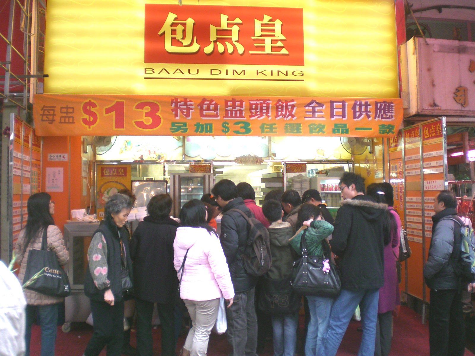 觀塘瑞和街街市